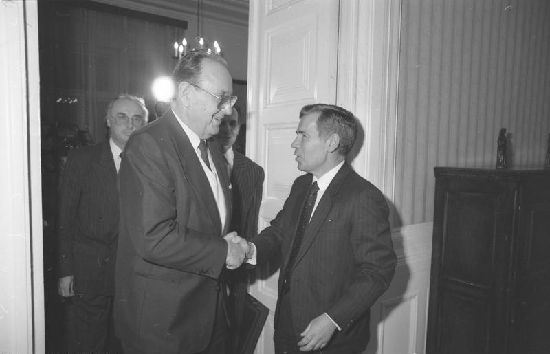 Bundesminister Genscher in Ungarn 23. - 24. November 1989